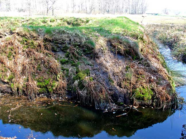 Poepenhemeltje, een schans bij Assen daterend uit 1672, naar verluid, opgeworpen door "Bommen Berend"